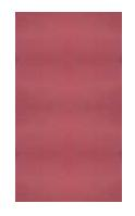 Lint van de Orde van George I eigen tekening